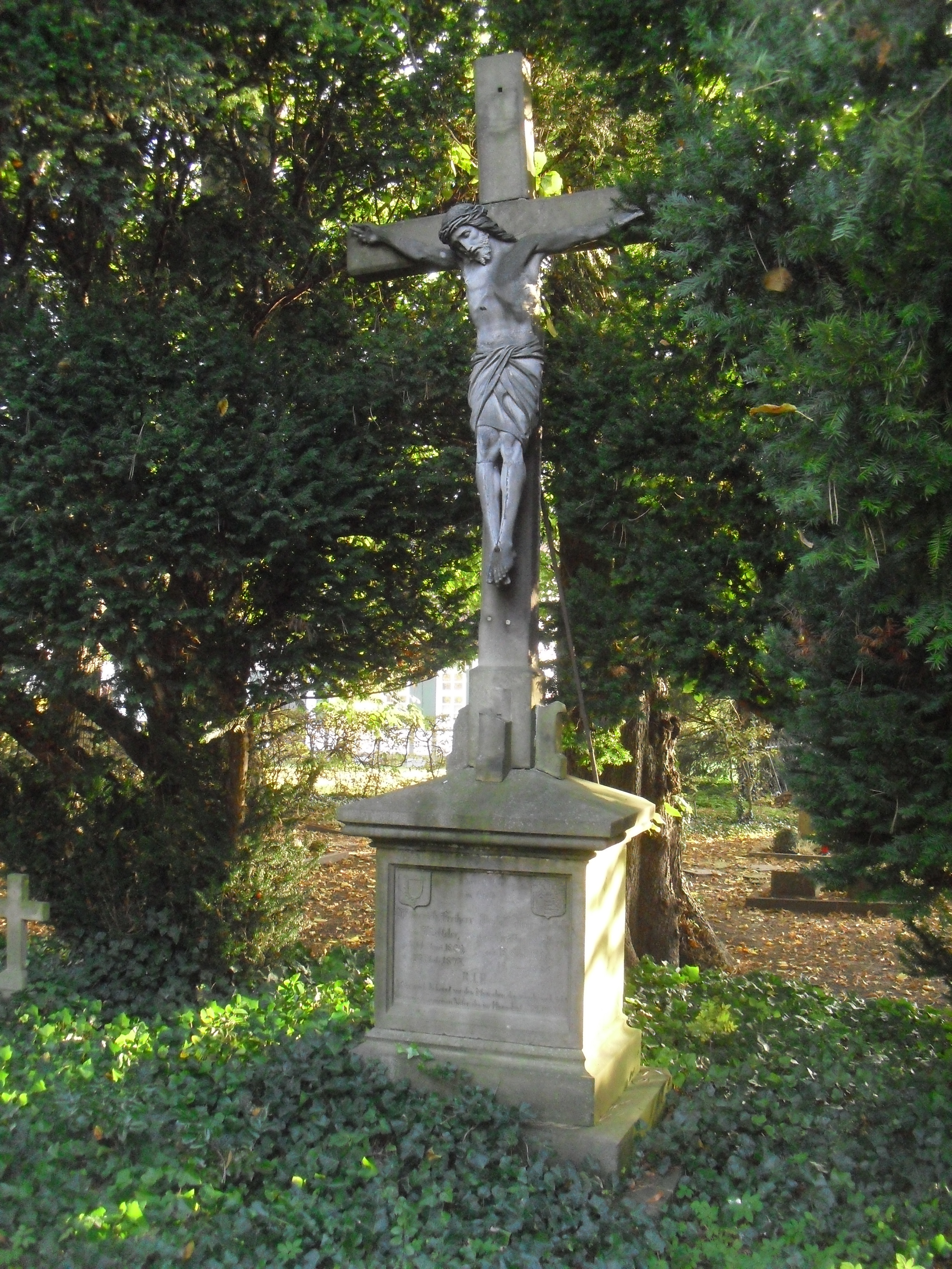 Grabmal von Wilderich und Pauline von Ketteler